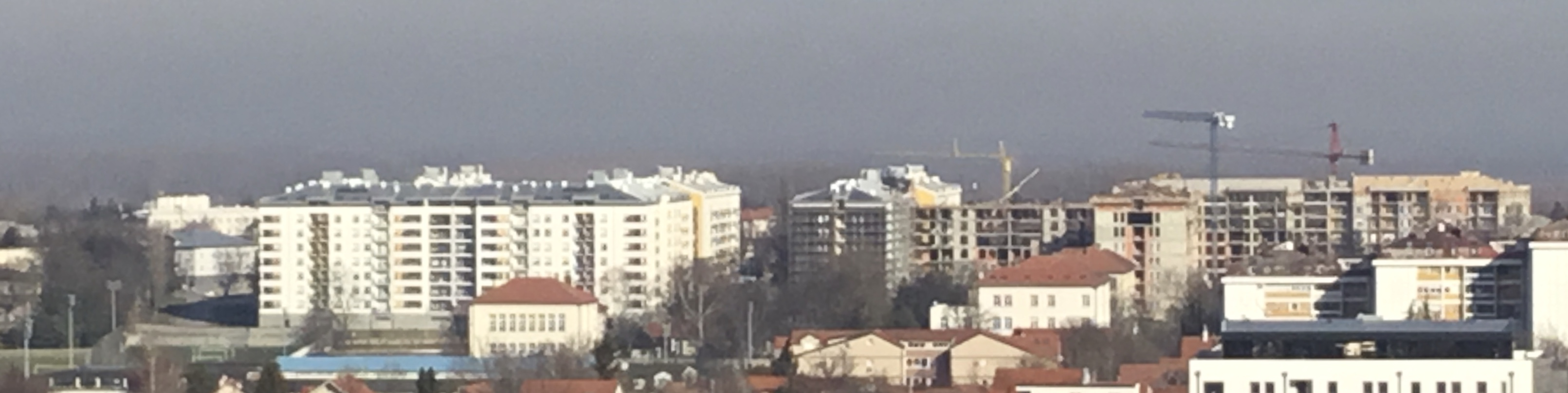 Naselje Zemunske kapija